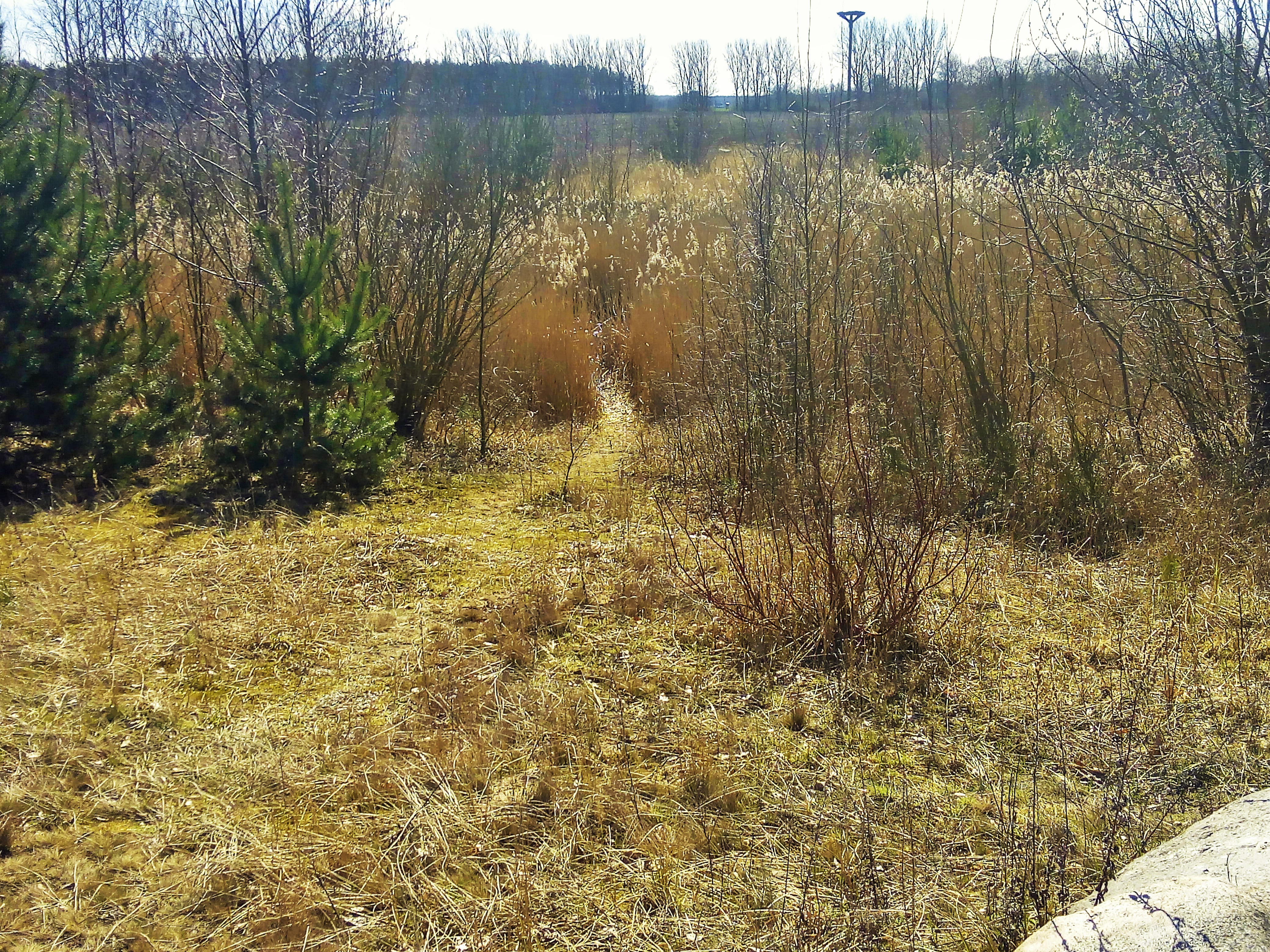 Pfad zum Rundweg im Biotop am Findlingsgarten in Zitterpenningshagen